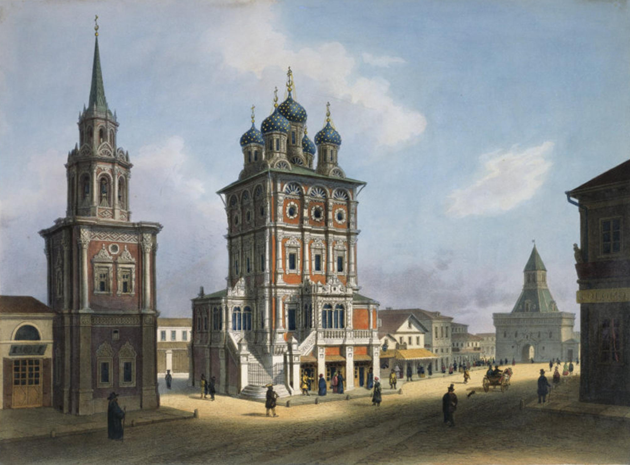 Церковь Николы Большой Крест на Ильинке